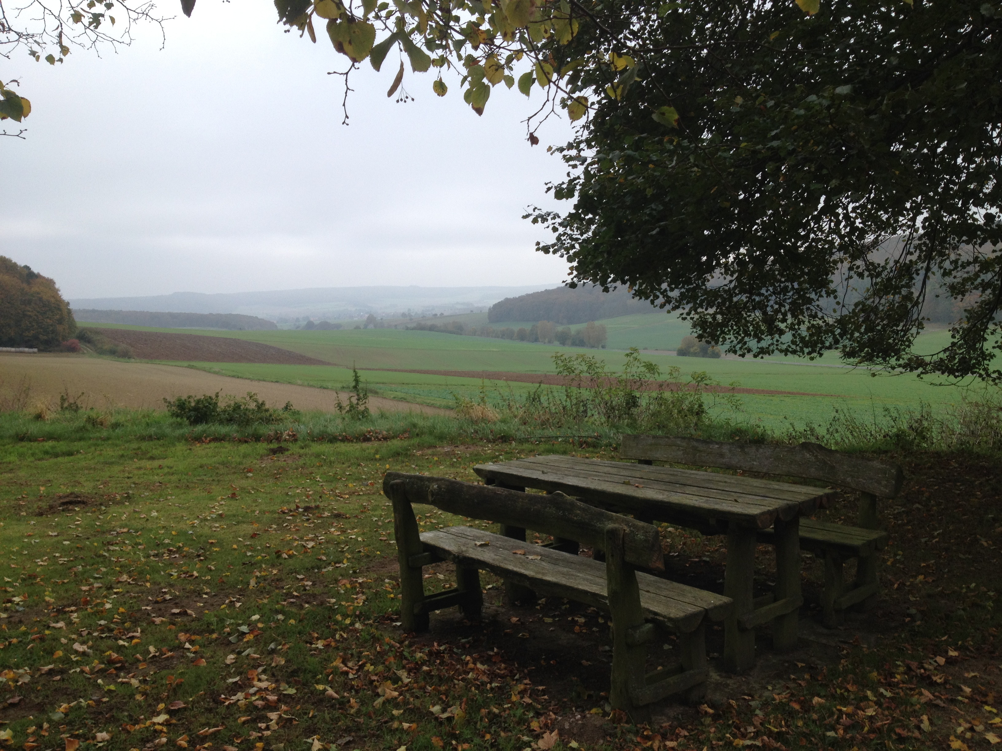 Der Fulda-Diemel-Weg (F) und der Märchenlandweg (M) an der Alten Ersener Rügegerichtsstätte östlich von Ersen zwischen Ersen und dem Waldgebiet Lied